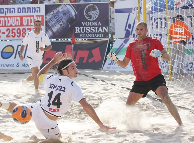 בחולצה האדומה - נמרוד בוכמן, במסגרת משחק בליגה לכדורגל חופים, נתניה 2008